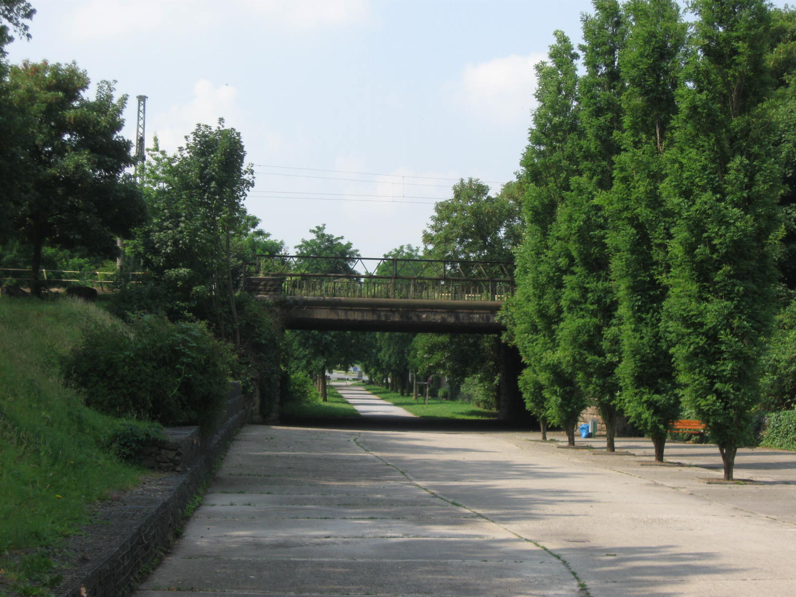 Trasse der ehemaligen Bahnstrecke Ruhrort-Meiderich Nord-Gelsenkirchen, Unterführung unter der Güterzugstrecke Meiderich Süd - Beeck